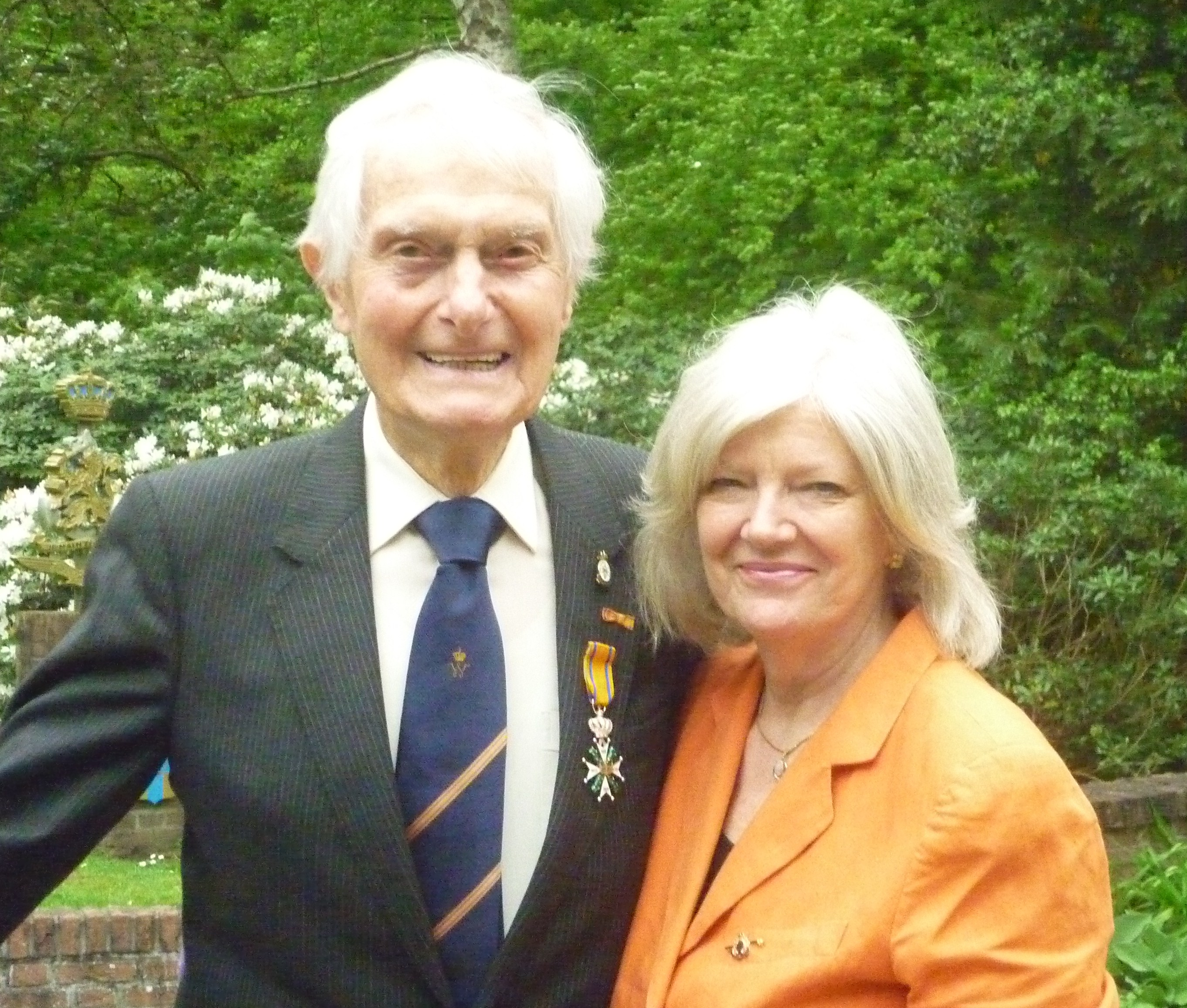 Kenneth Mayhew, ridder MWO,, op De Zwaluwenberg